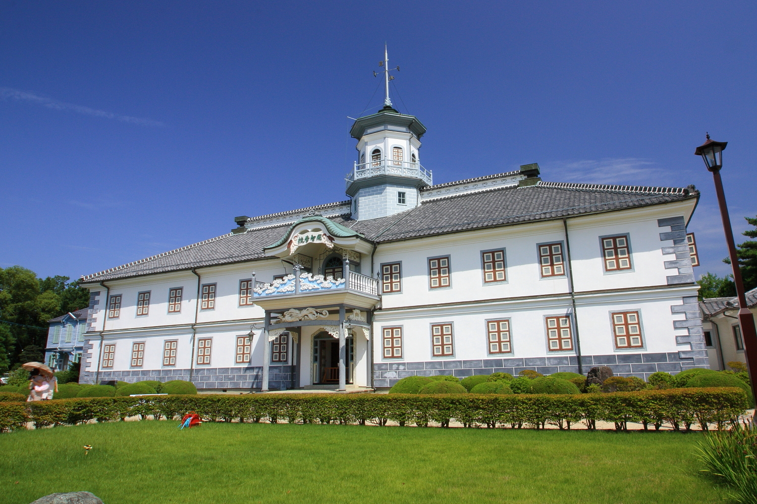 旧開智学校校舎外観（松本市開智、2009年（平成21年）8月）